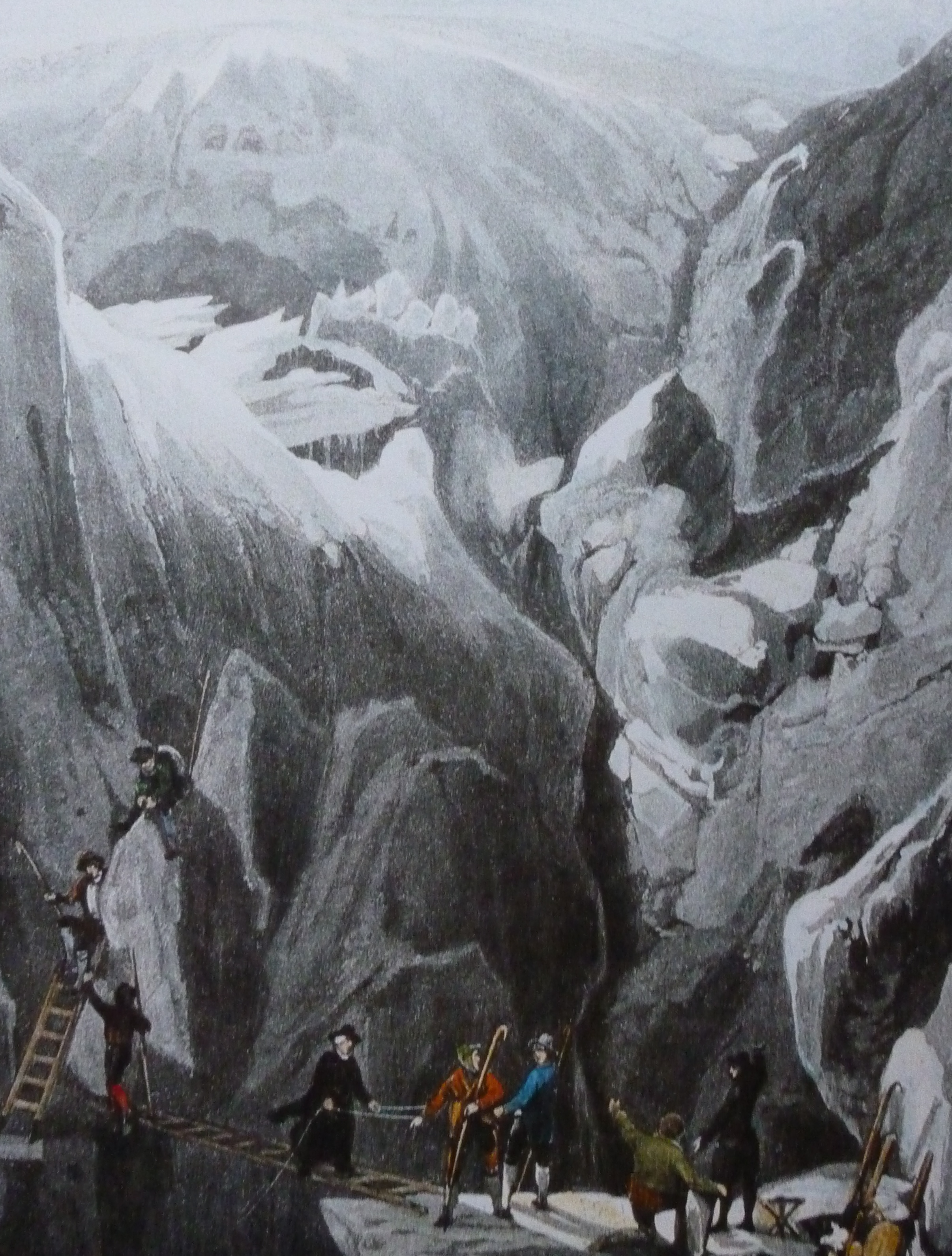 «Hinterrhein» Phantasieansicht einer Überquerung eines Gletschers am Rheinwaldhorn; auf der Leiter Placidus a Spescha. Kol. Acquatinta von Johann Ludwig Bleuler; 1818